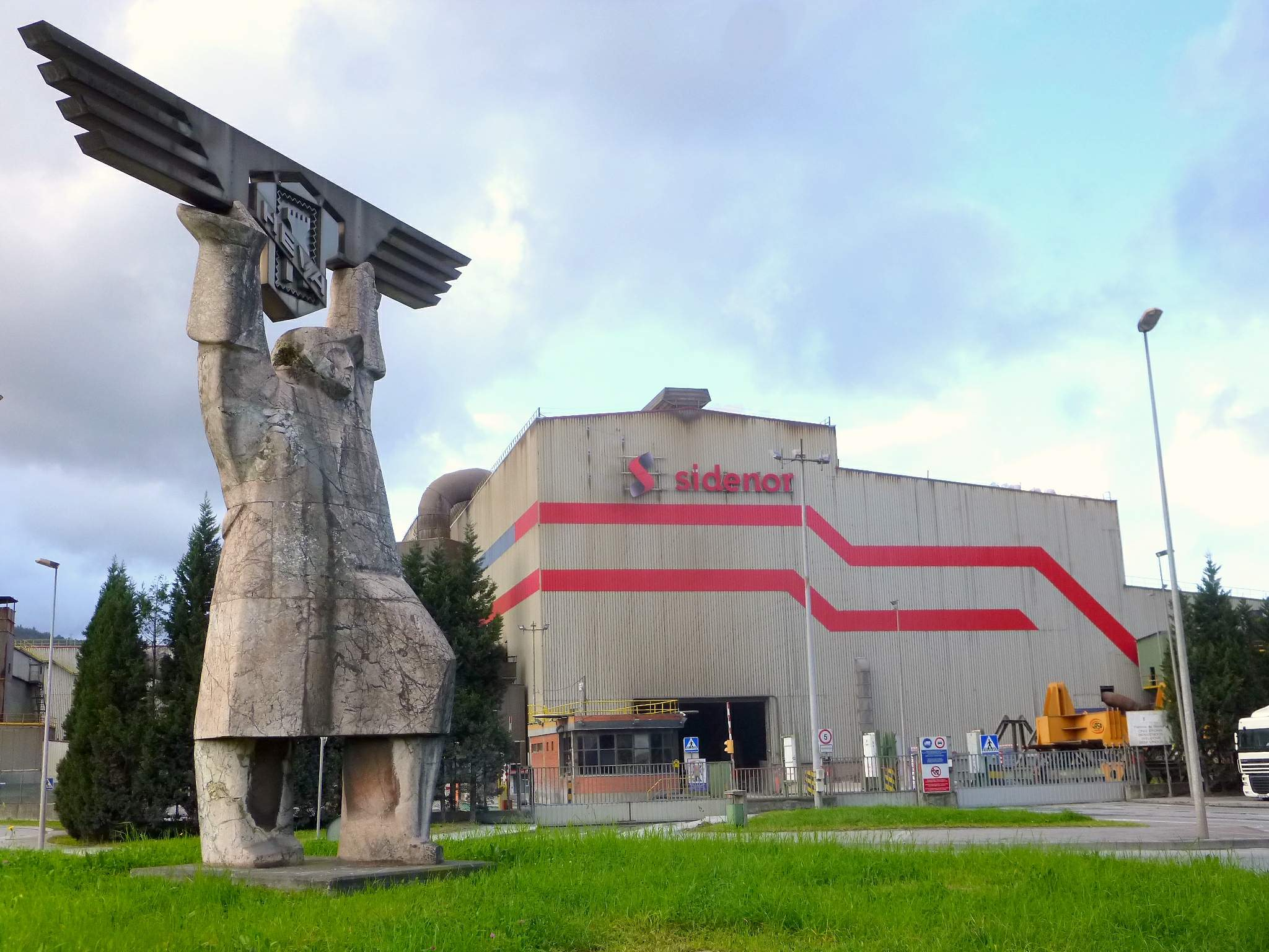 Planta de Sidenor en Basauri (Vizcaya)